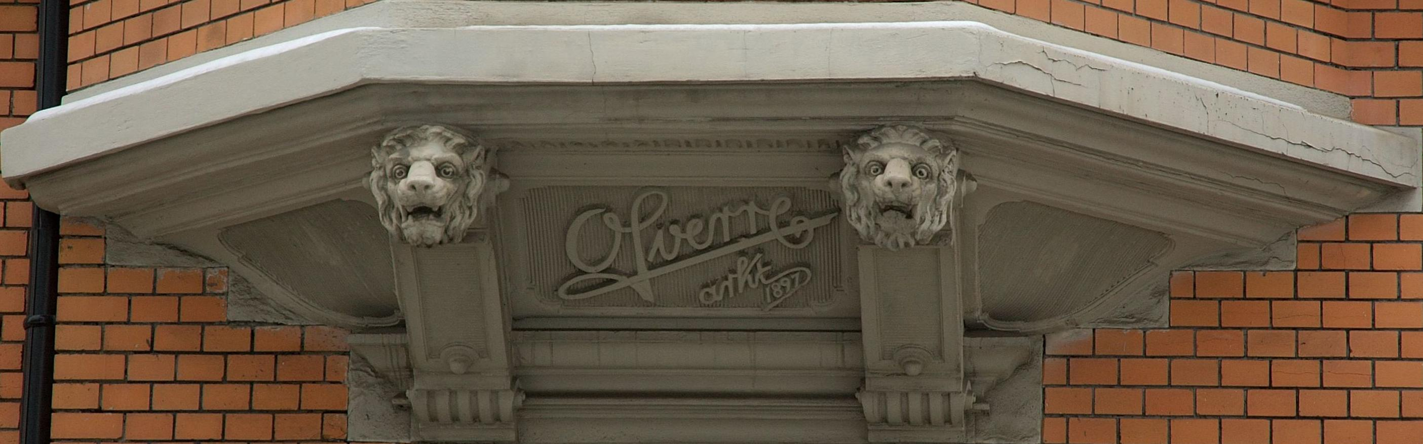 Sverreslottet tegnet av arkitekt Ole Sverre. Stor hjørnegård Drammensveien 44b og Thomles gate 4-6. Detalj fra Drammensveien med arkitektens signatur.